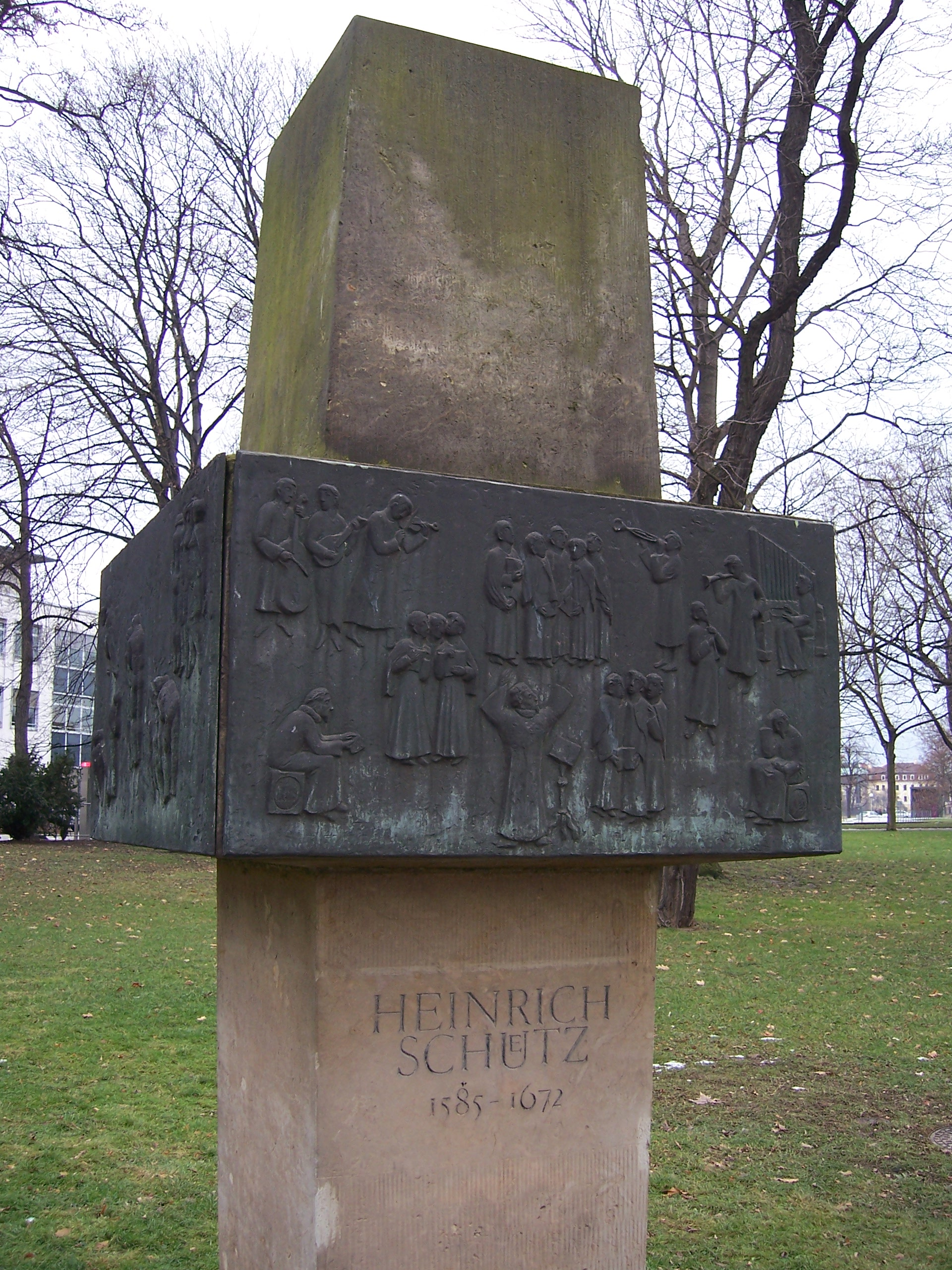 Denkmal von Berndt Wilde für Heinrich Schütz am Zwingerteich in Dresden.